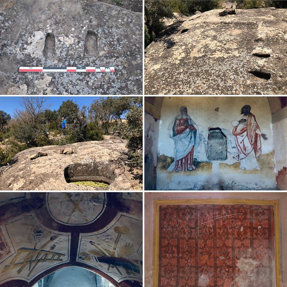 S'explica que aquestes marques servien per a fer-hi posar els peus als condemnats per dessagnar-los i fer servir la seva sang per fer pintura vermella per a pintar les esglésies. En realitat servien per a muntar-hi premses de biga transportables per a extreure el most de la brisa després d'haver trepitjat el raïm de les vinyes del costat.